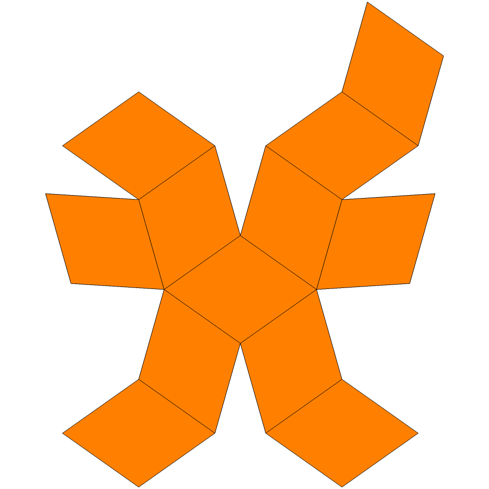 Rhombicdodecahedron net